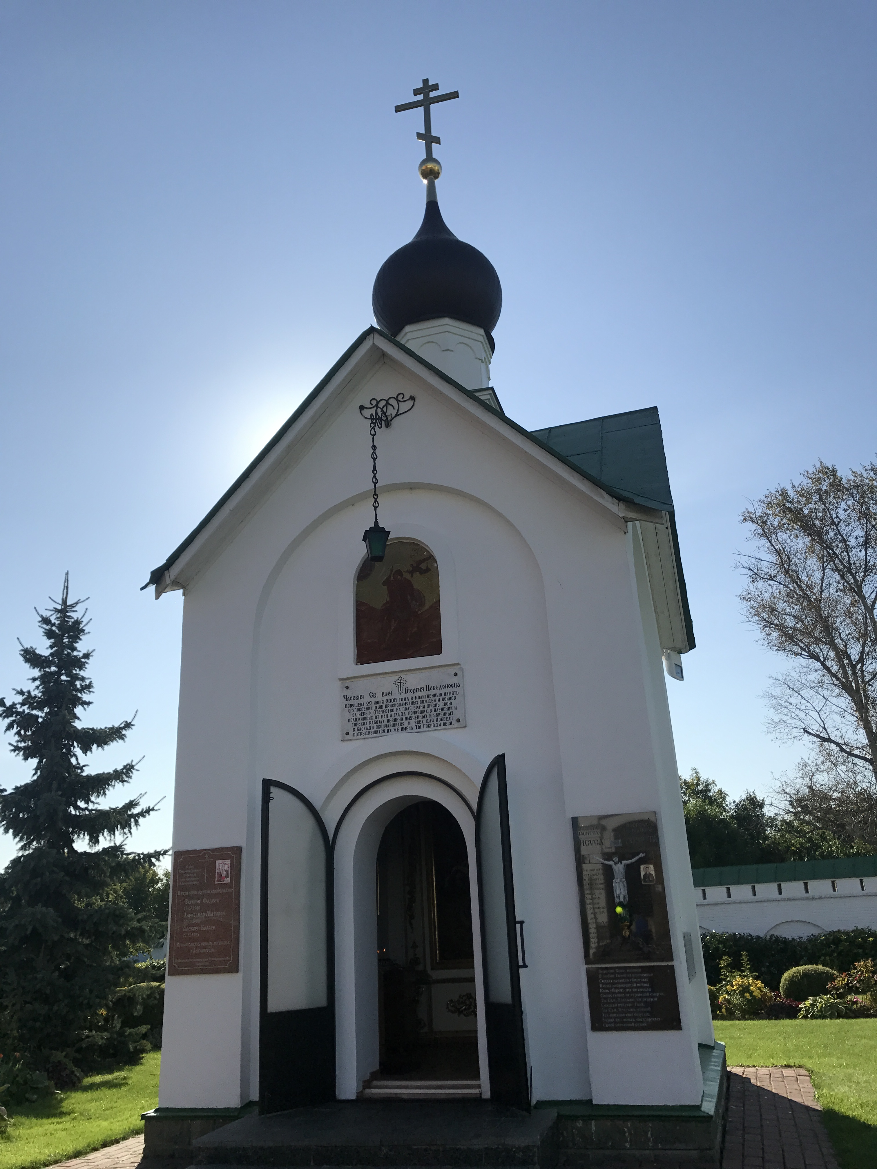 Часовня Св. Георгия Победоносца в Спасо-Преображенском монастыре г. Мурома